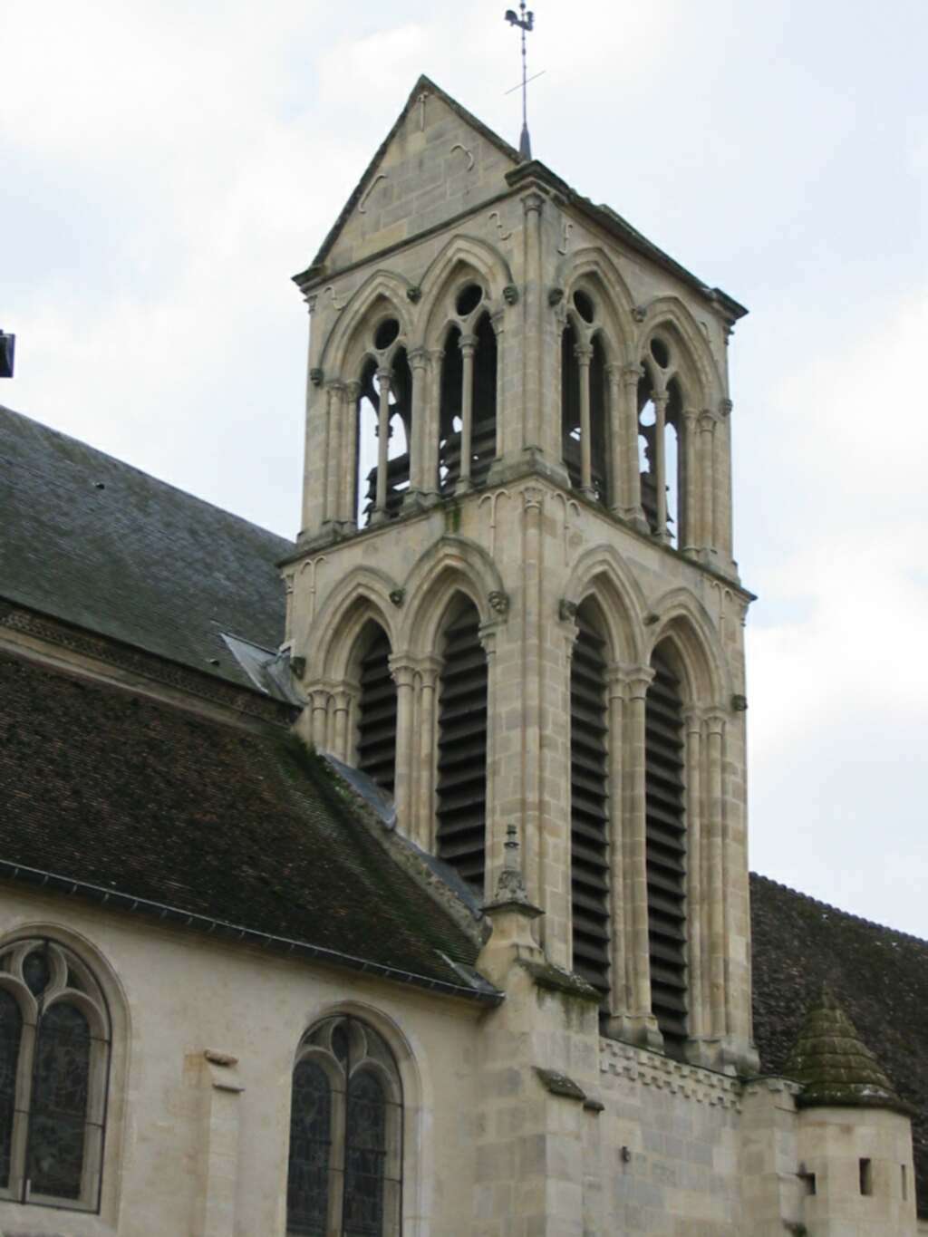 Clocher Mézières 110401; Photo JH Mora